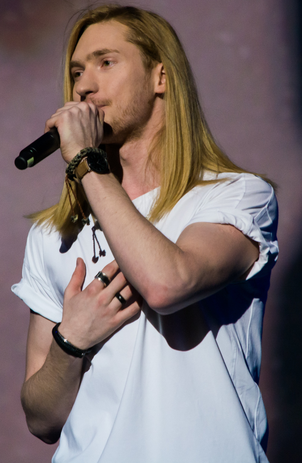 Александр Иванов (Ivan) на концерте Новые Дети (26.03.2017)